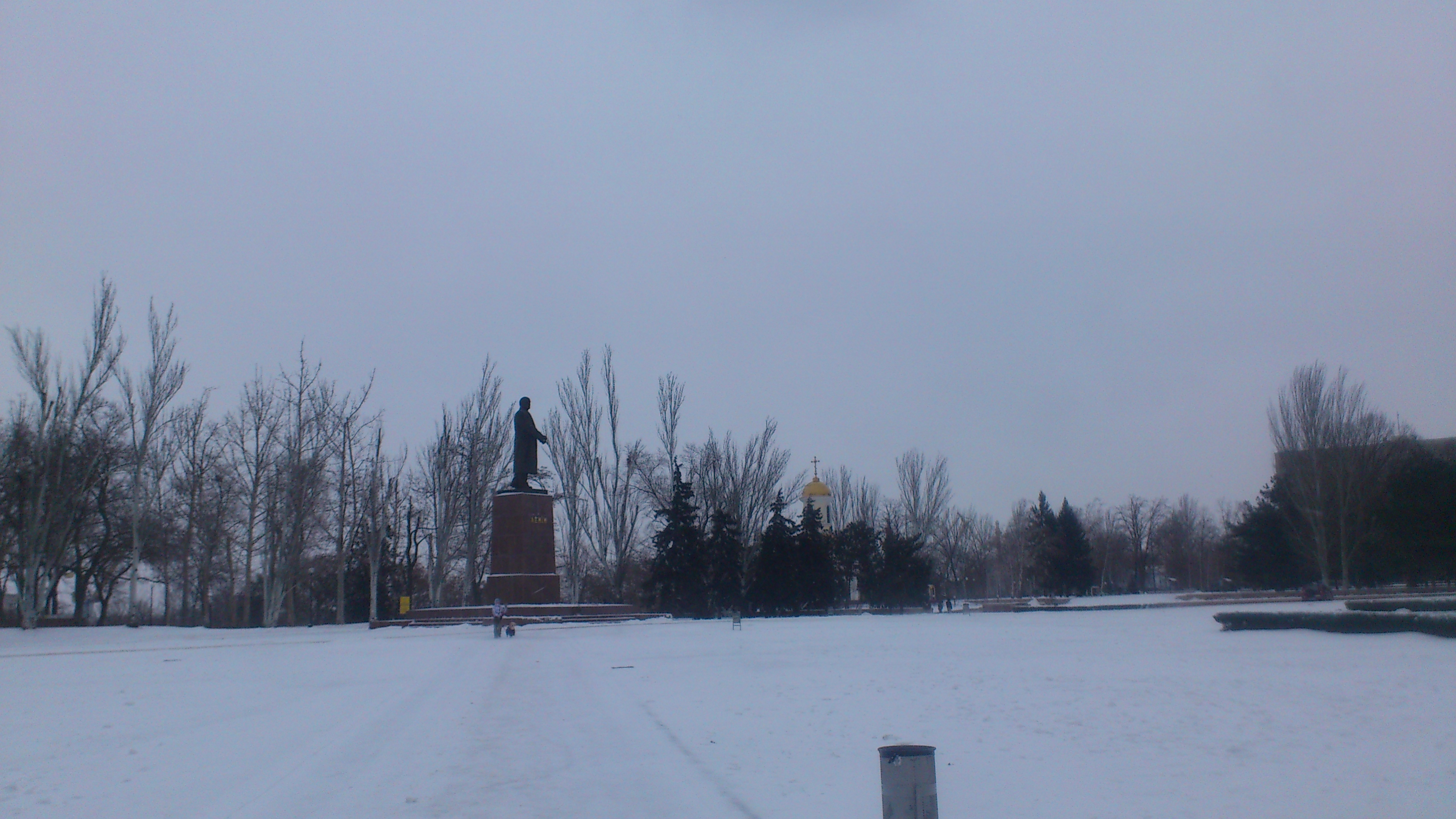 Пам'ятник за 3 тижні до знесення